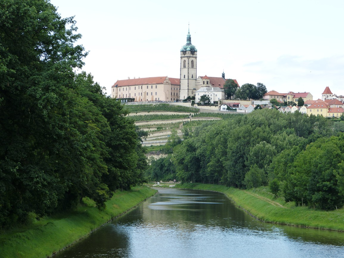 Zámek Mělník